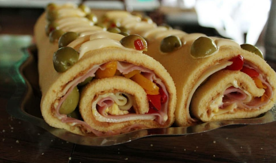 Arrollados de pan con relleno salado (jamón, queso crema, aceitunas, mostaza, salsa Lizano, chile dulce y cebolla) típicos de Costa Rica